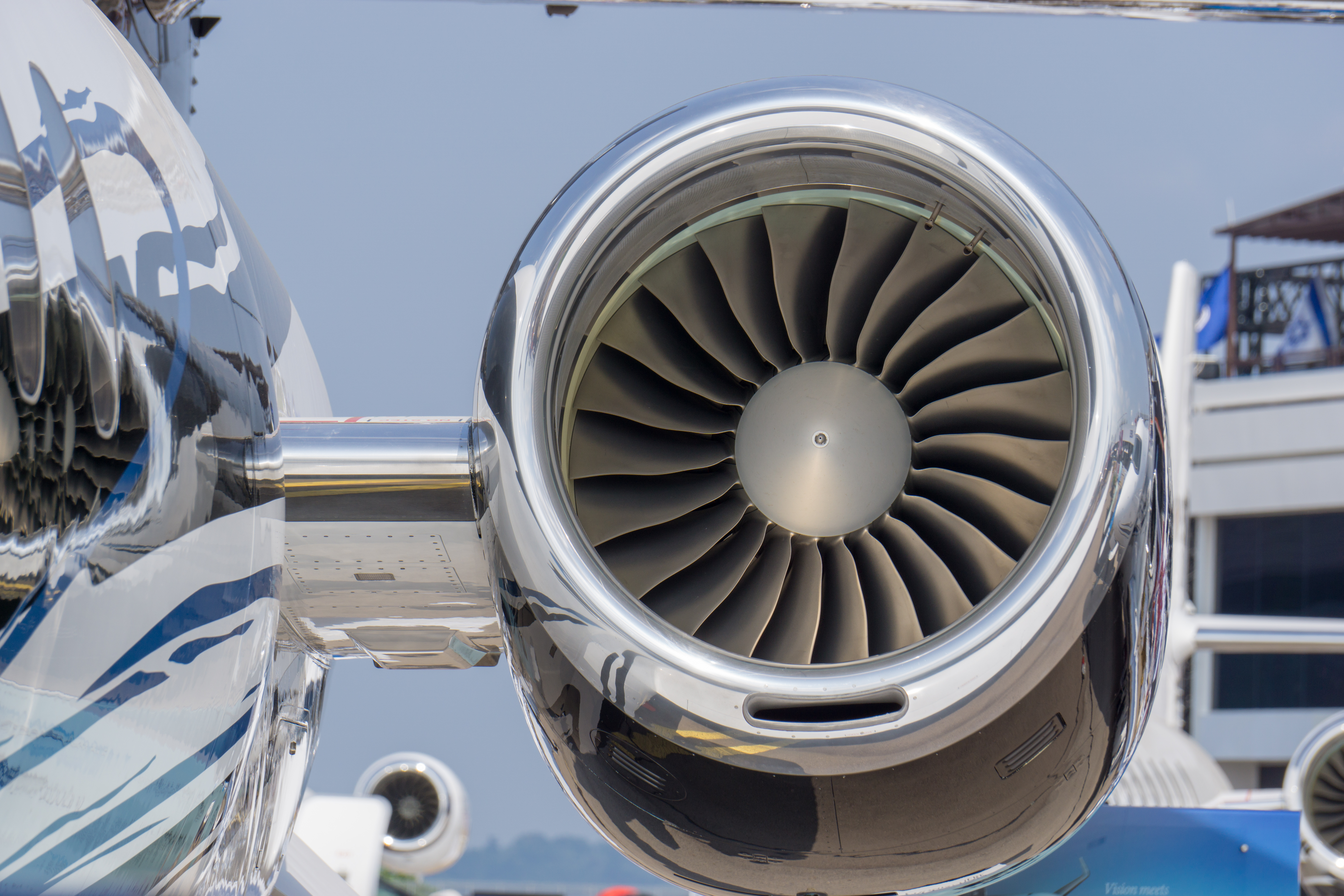 Aircraft Engine